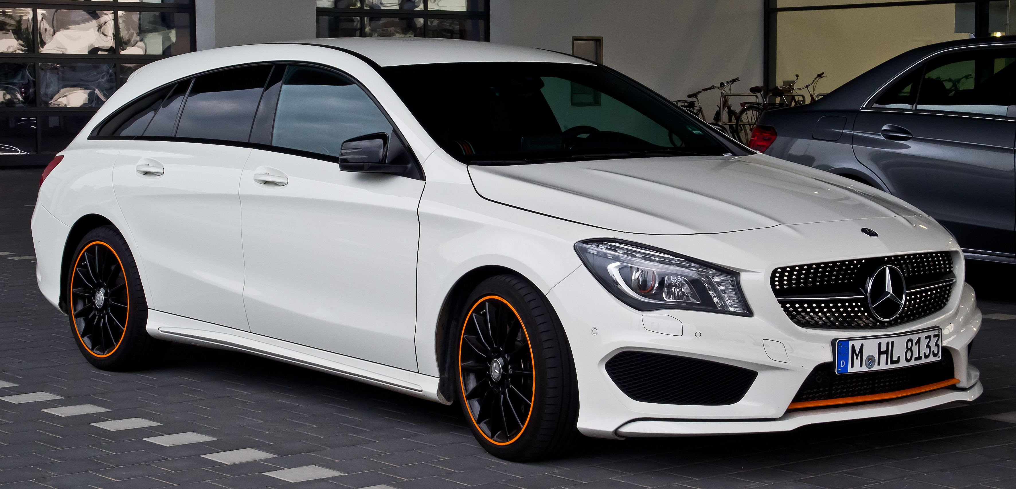 Mercedes-Benz CLA 220 d Shooting Brake OrangeArt Edition (X 117)